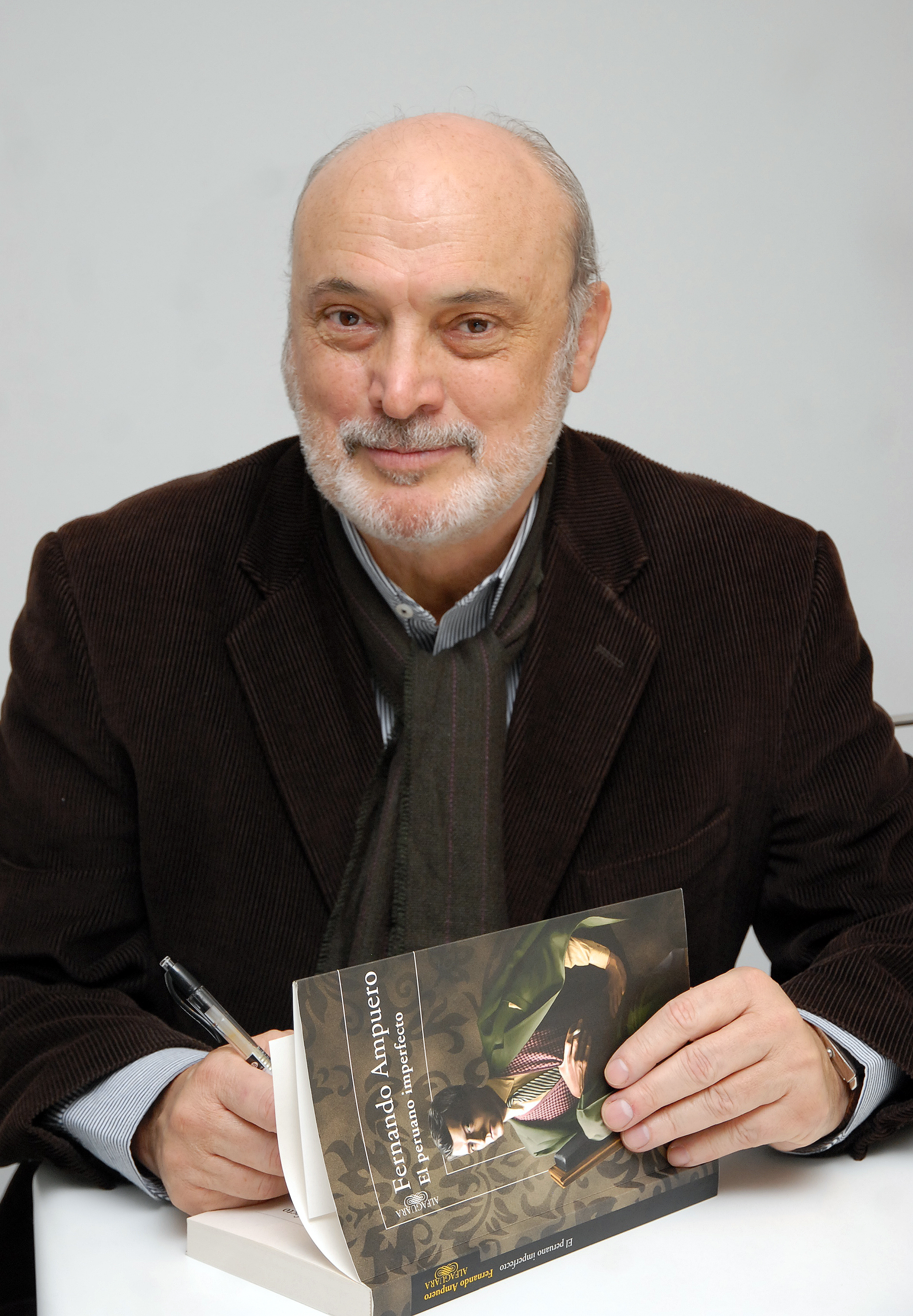 Fernando Ampuero presenta El peruano imperfecto en la Cátedra Bolaño.